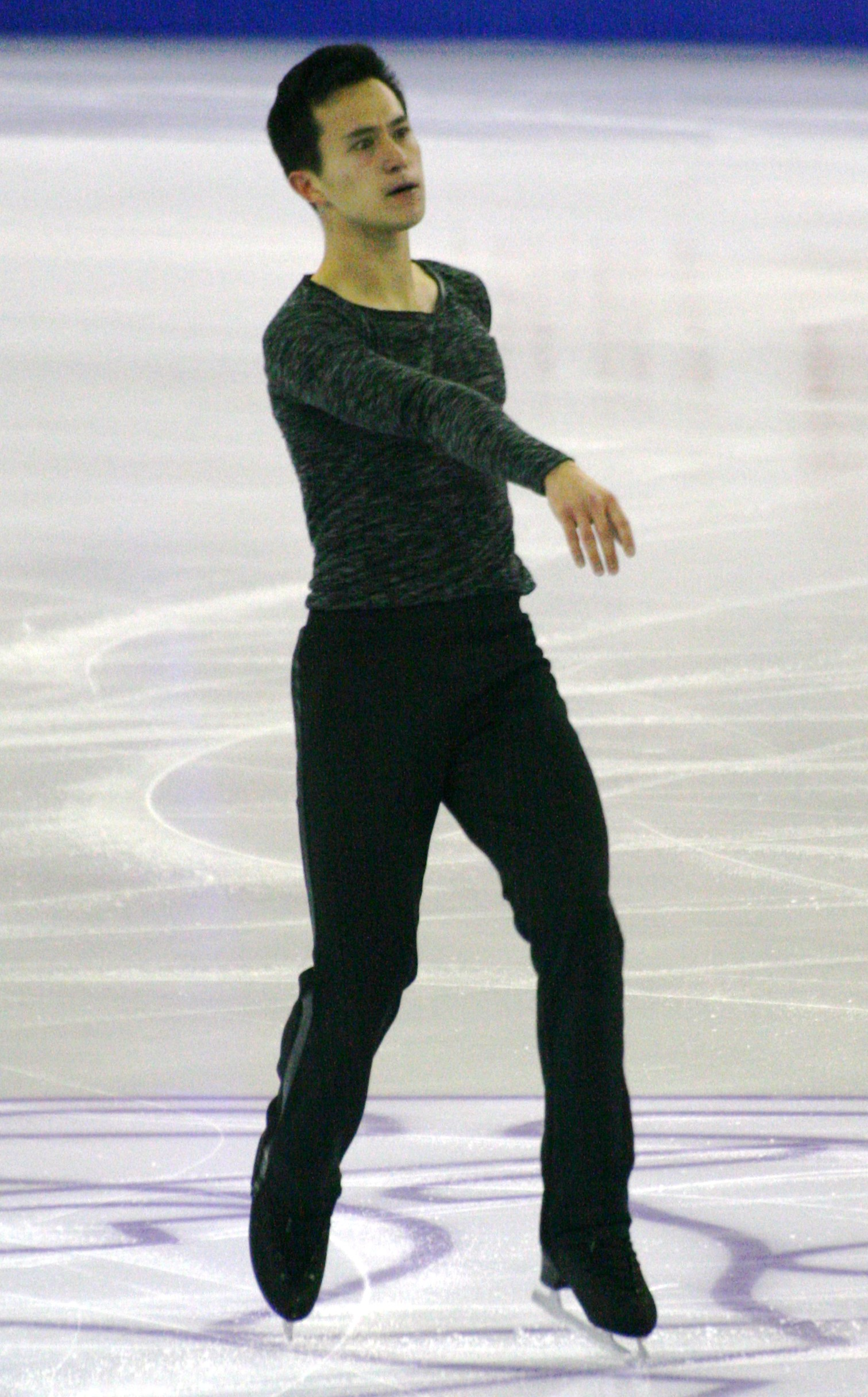 Патрик Чан (Канада) на финале Гран-при по фигурному катанию 2015-2016.